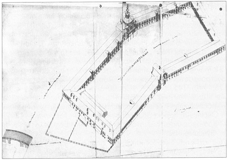 Конюшенный двор. Фрагмент аксонометрического плана П. де Сент-Илера. 1765—1773 гг. РГА ВМФ